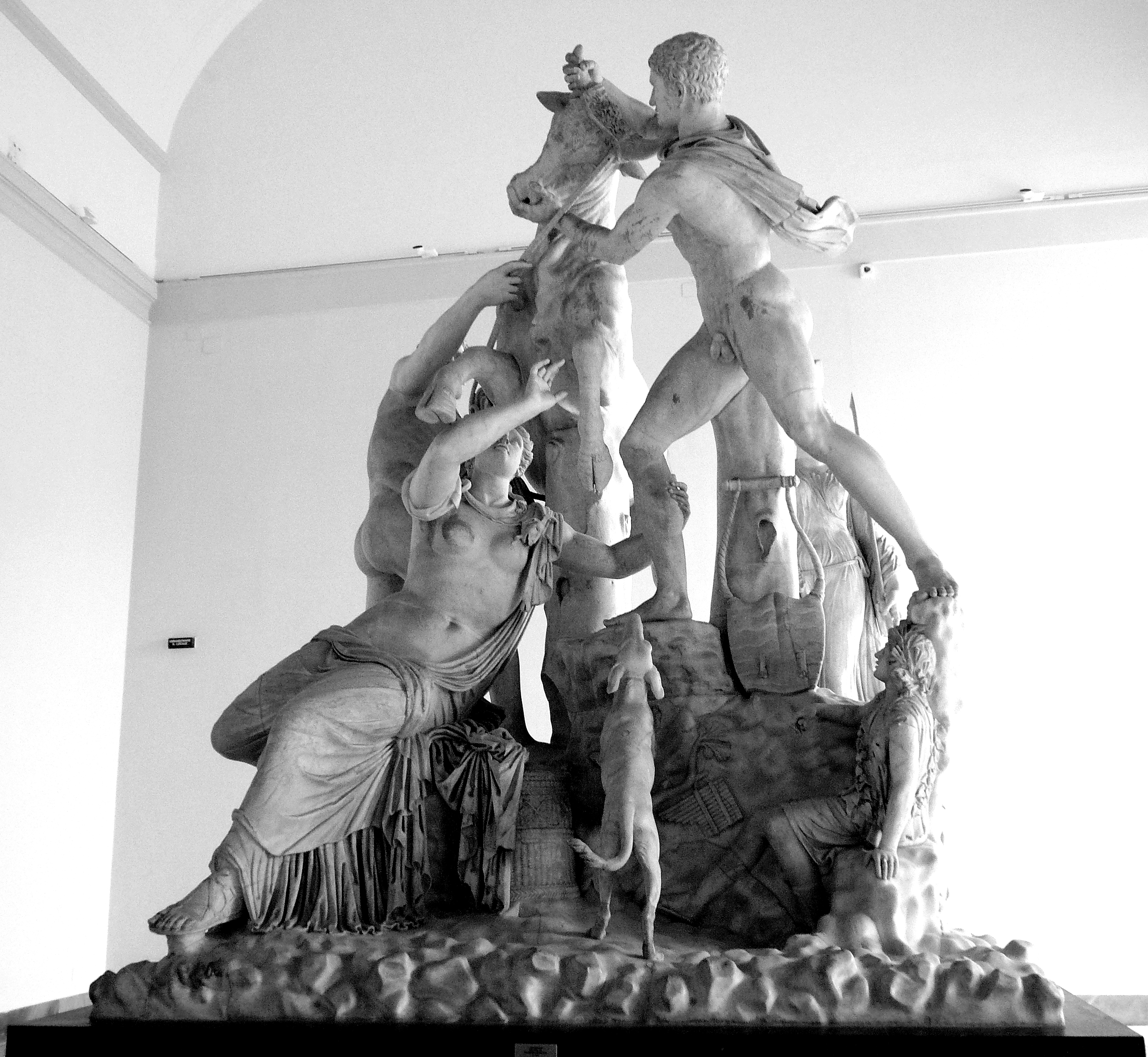 statua del Toro Farnese. Napoli, Museo Archeologico Nazionale. Autore foto: Roberto De Martino